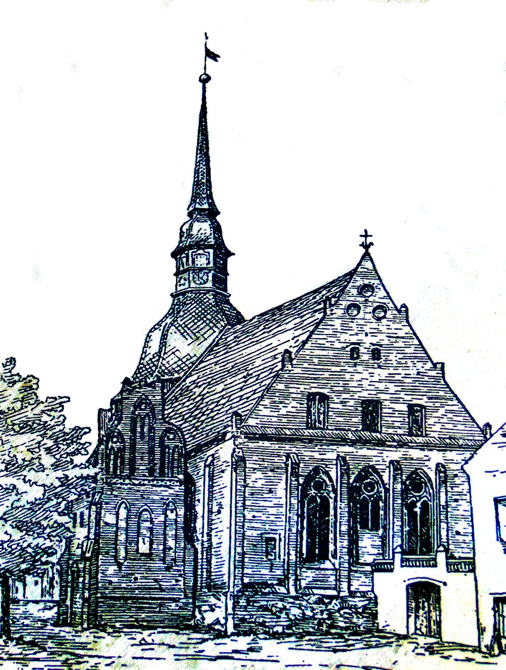 Grafika z 1884 r. przedstawiająca nieistniejący kościół mariacki w Policach oraz zachowaną do dnia dzisiejszego kaplicę.